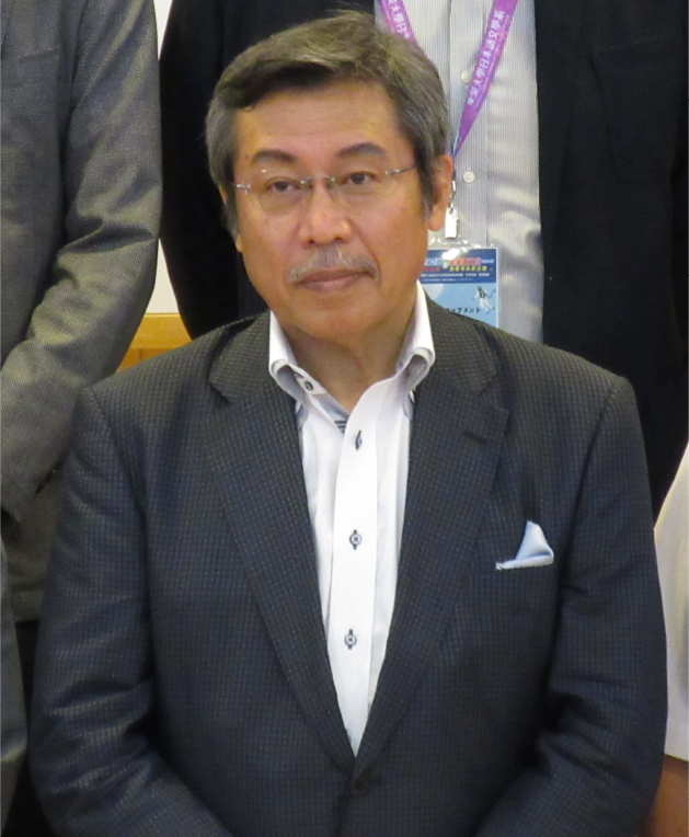 弘兼憲史於2018年5月25日在東吳大學演說